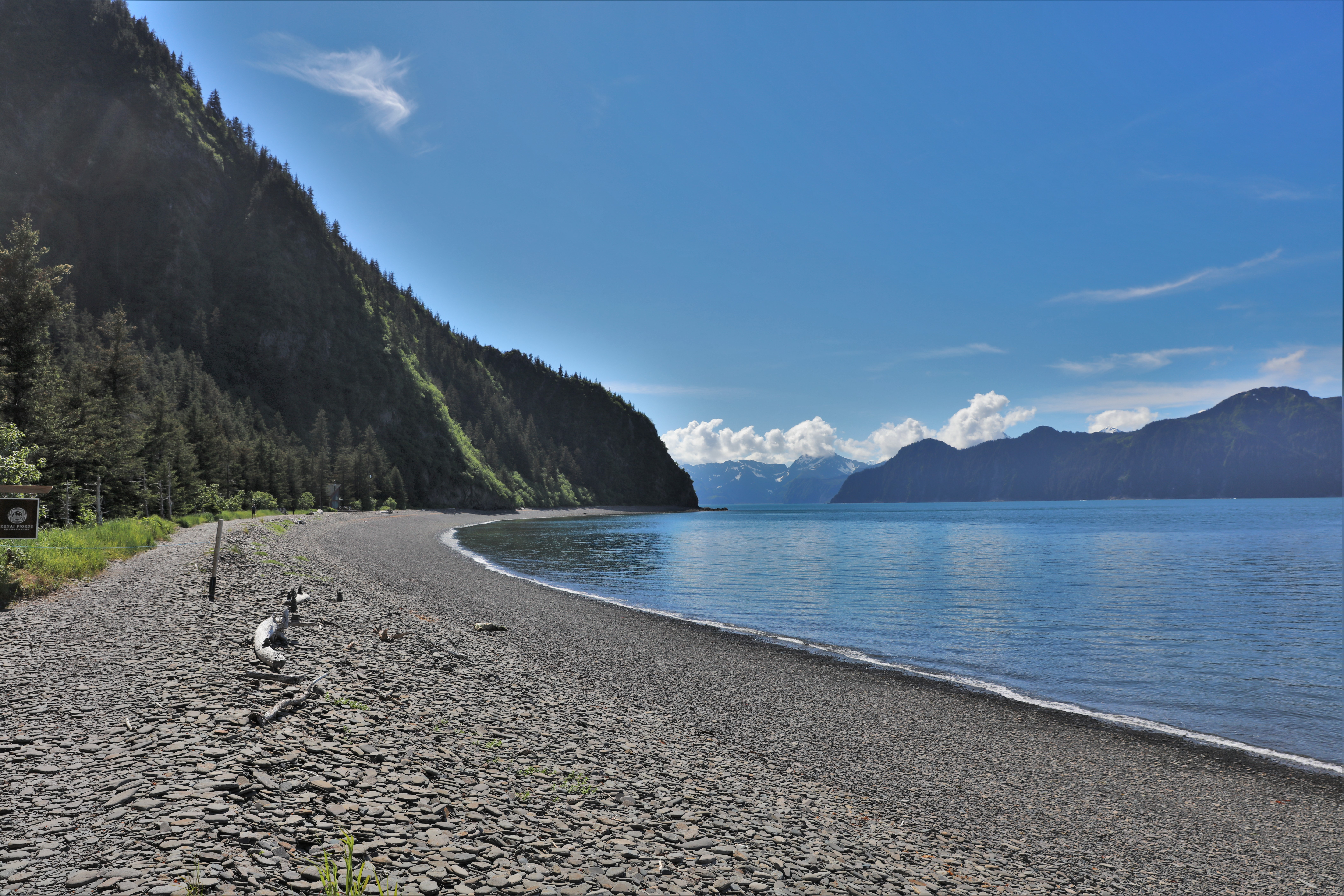 Una spiaggia dell'isola